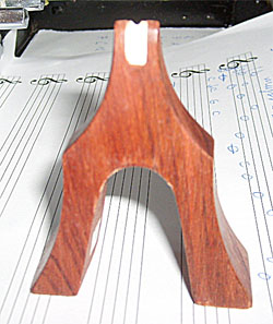 Brücke einer Yatga